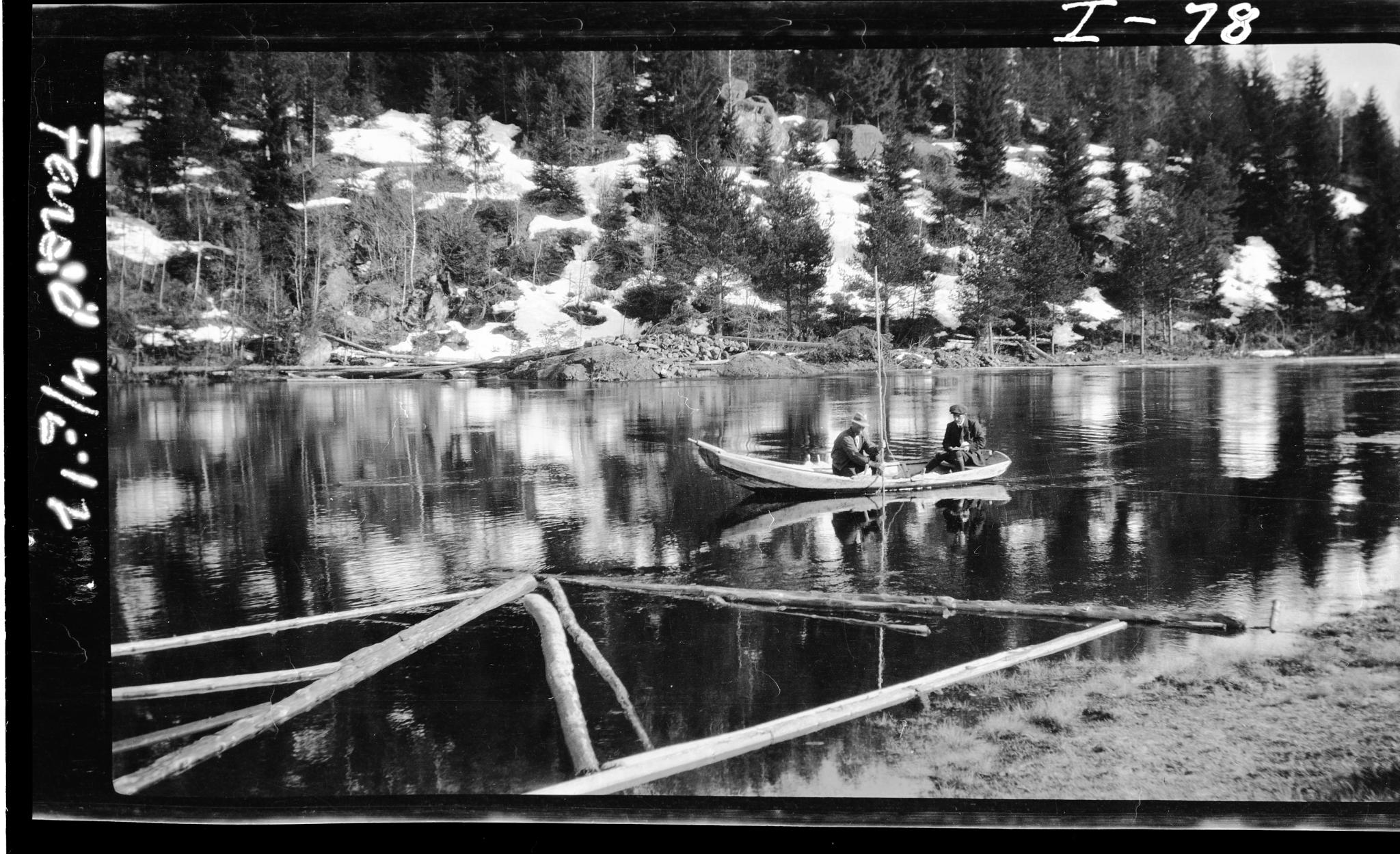 Målested Farsjøs utløp. Ca 200 meter nedenfor Farsjø. Hydrologisk avdeling. Dato: 04.05.1917